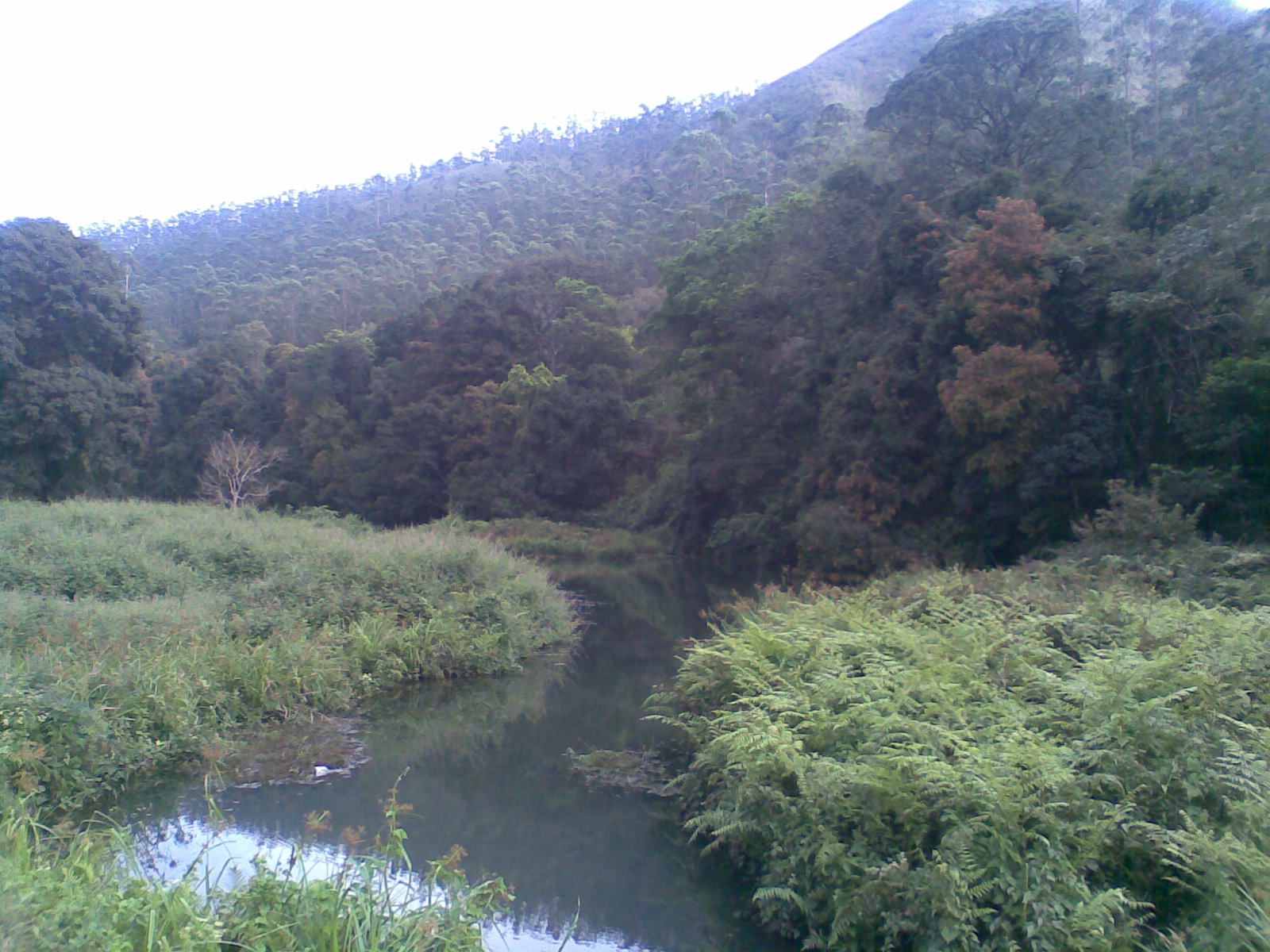 മുല്ലപ്പെരിയാർ അണക്കെട്ടിൽ നിന്നും ബഹിർഗമിക്കുന്ന പെരിയാറിന്റെ ഒരു ദൃശ്യം